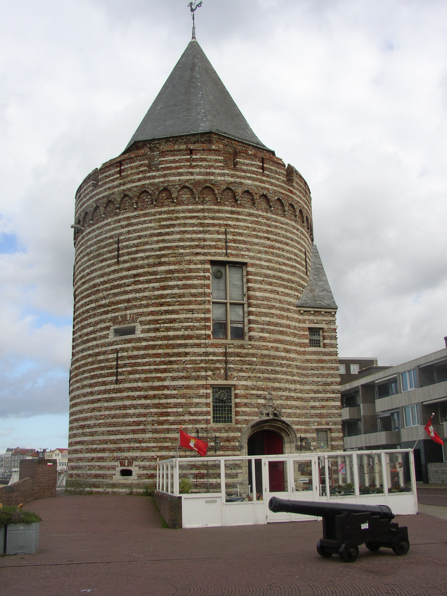 Turm in Vlissingen